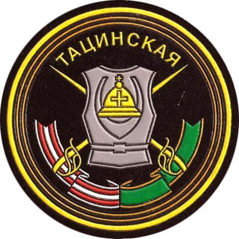 Нарукавный знак 5-й ОТБр (Улан-Удэ)